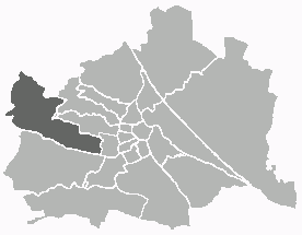 Positionskarte des 14. Wiener Gemeindebezirks Unter Verwendung einer Vorlage von Extrawurst. Public Domain.